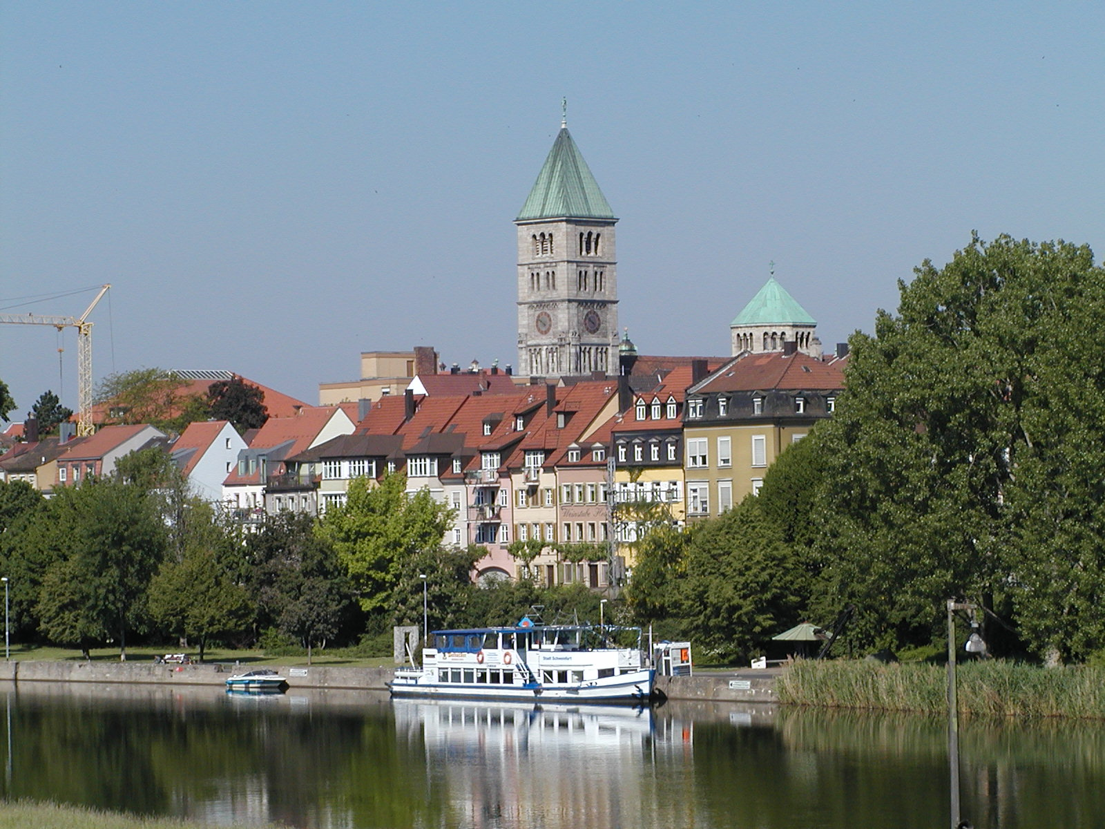 foto StaraBlazkova 2004